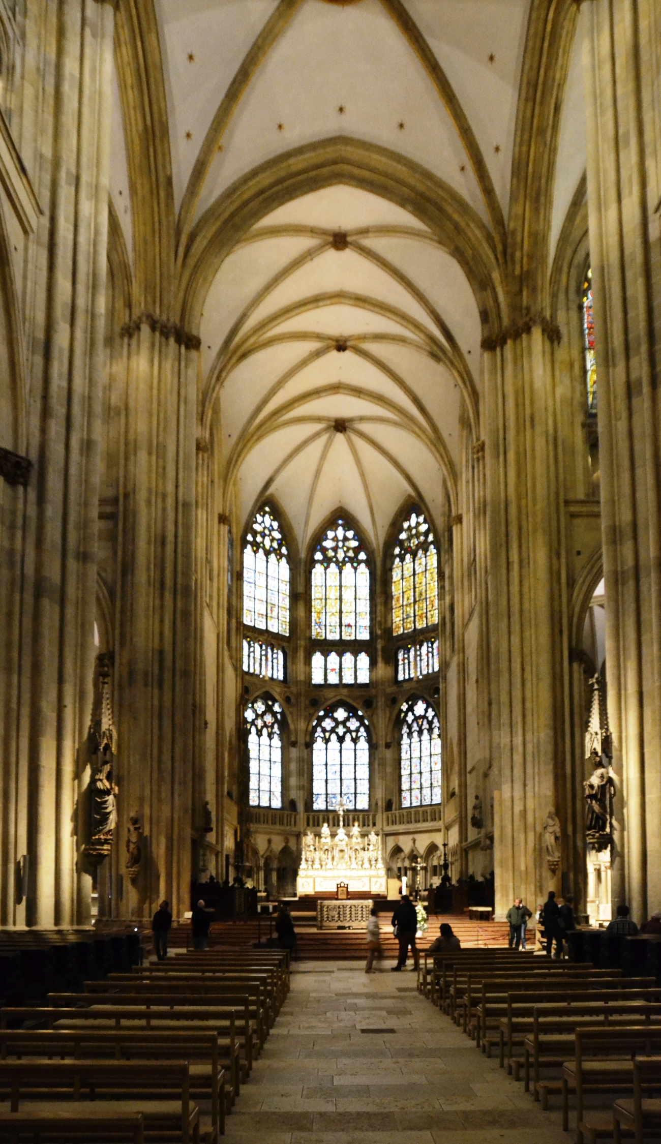 Im Inneren des Regensburger Doms.